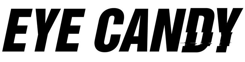 Logo de la série Eye Candy